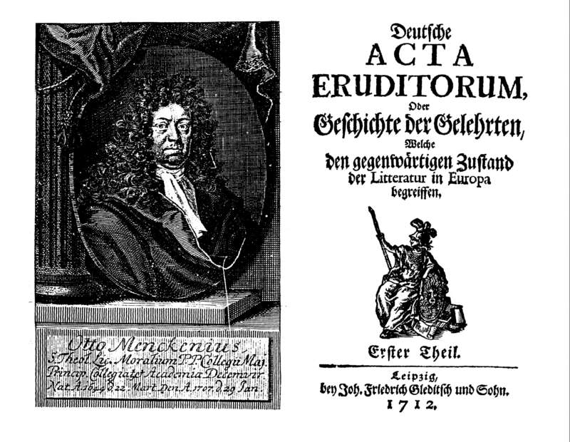 Titelseite der ersten Nummer der Deutschen Acta Eruditorum (1712)